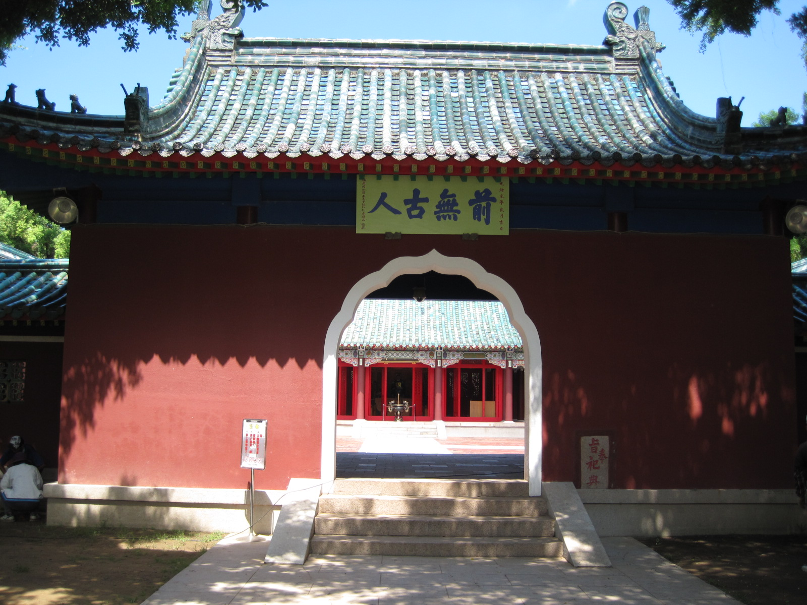 中文（台灣）: 臺南市的延平郡王祠。